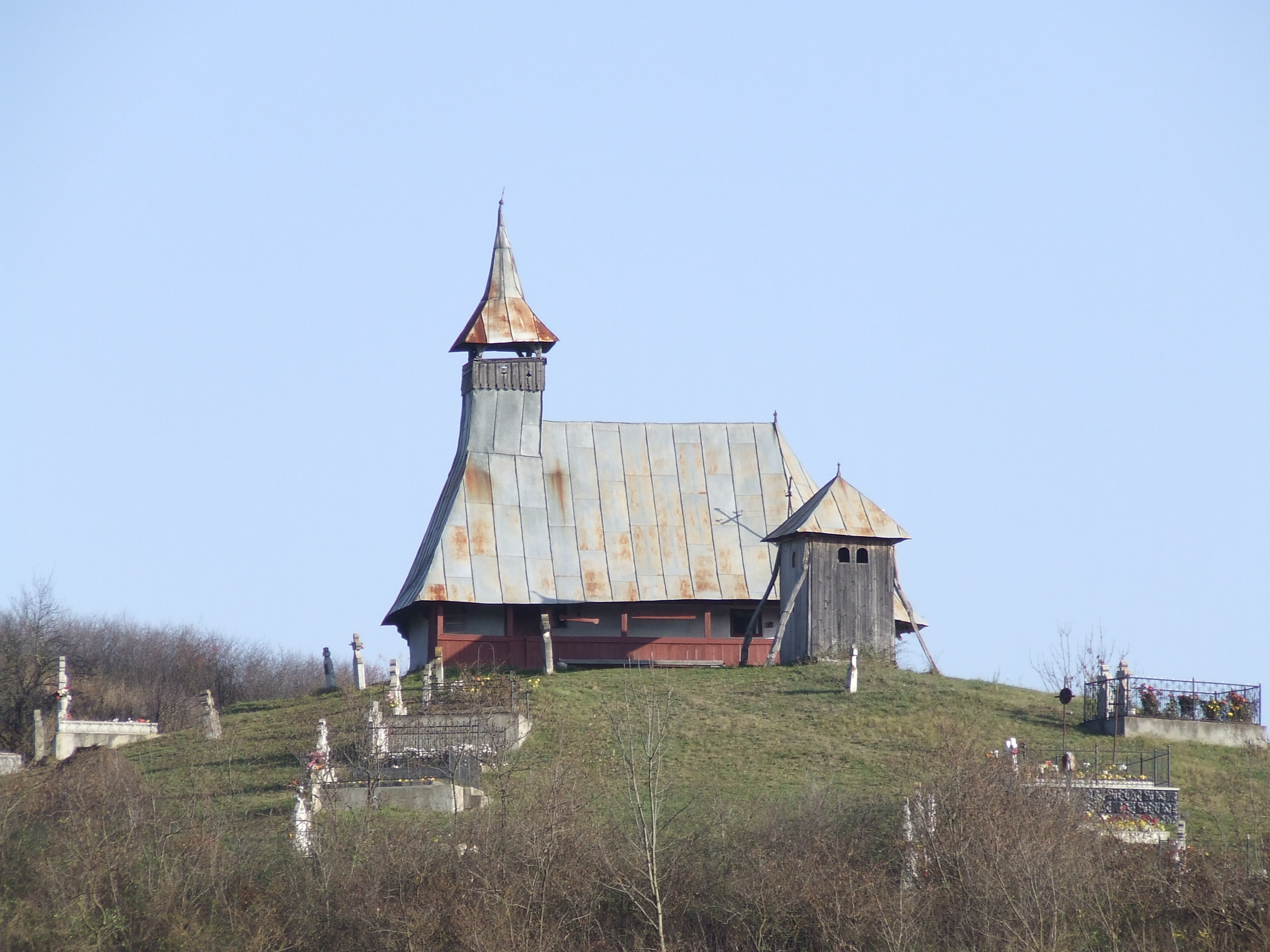 Biserica de lemn din Crişeni, judeţul Cluj.